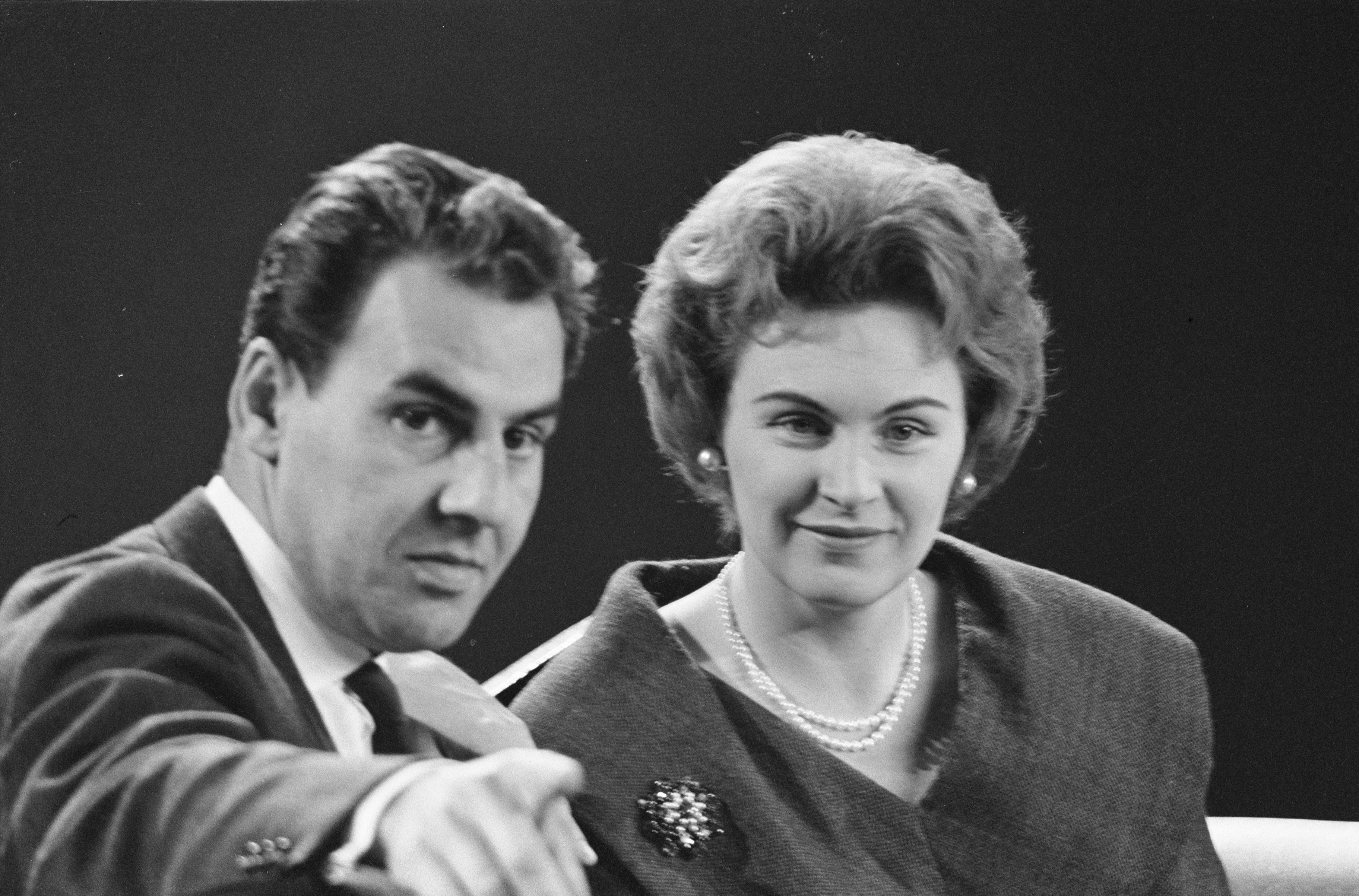 Collectie / Archief : Fotocollectie Anefo Reportage / Serie : [ onbekend ] Beschrijving : Willem Duys en Erna Spoorenberg Datum : 8 oktober 1961 Persoonsnaam : Duys, Willem, Spoorenberg, Erna Fotograaf : Rossem, Wim van / Anefo Auteursrechthebbende : Nationaal Archief Materiaalsoort : Negatief (zwart/wit) Nummer archiefinventaris : bekijk toegang 2.24.01.05 Bestanddeelnummer : 913-0255